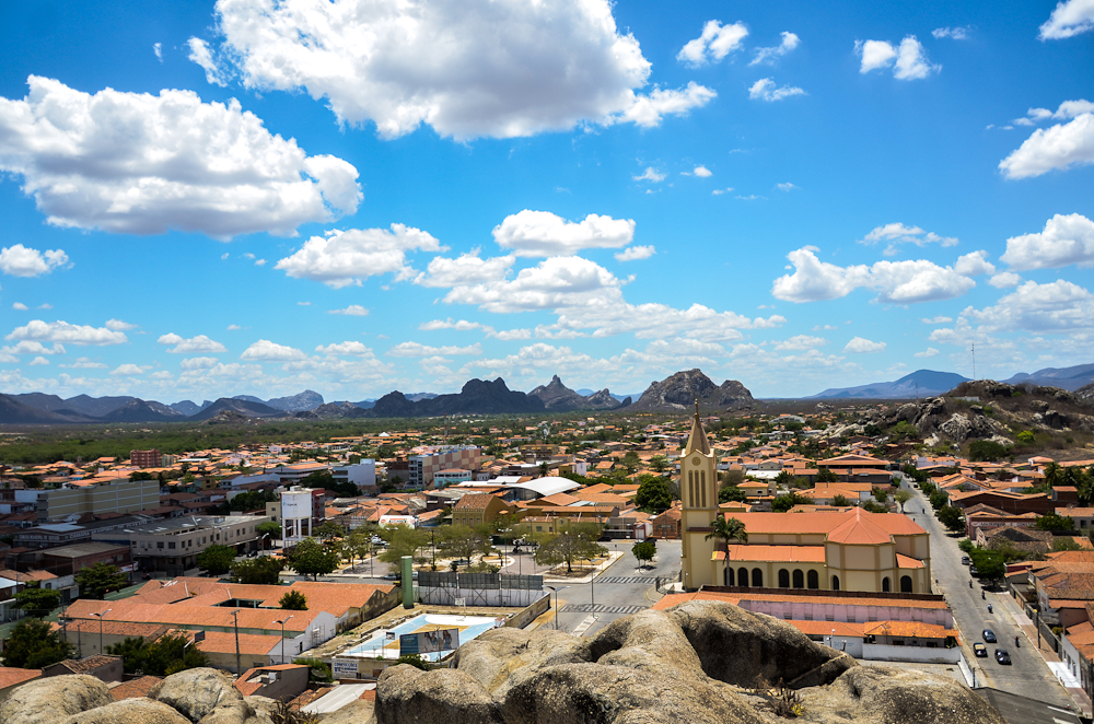 A turma que participou da oficina de Comunicação Colaborativa, a primeira da sequência de atividades de formação livre da FECIQ, fez um passeio fotográfico pela cidade como prática fotográfica. (CC BY SA) Fora do Eixo